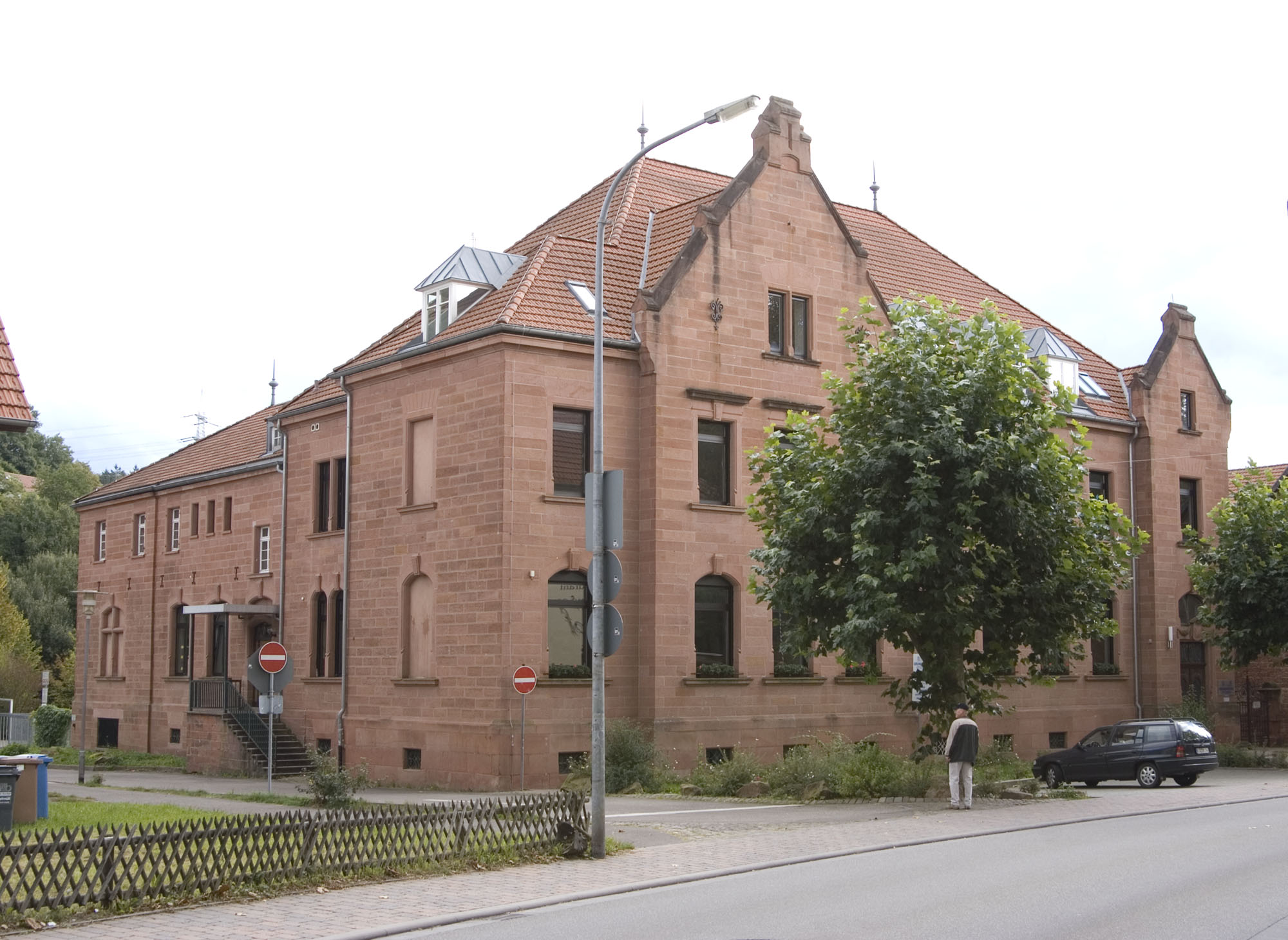 Hauptstraße 20: ehemaliges Amtsgericht (Schiller-Schule); Rotsandsteinquaderbau, Giebelrisailte, um 1900